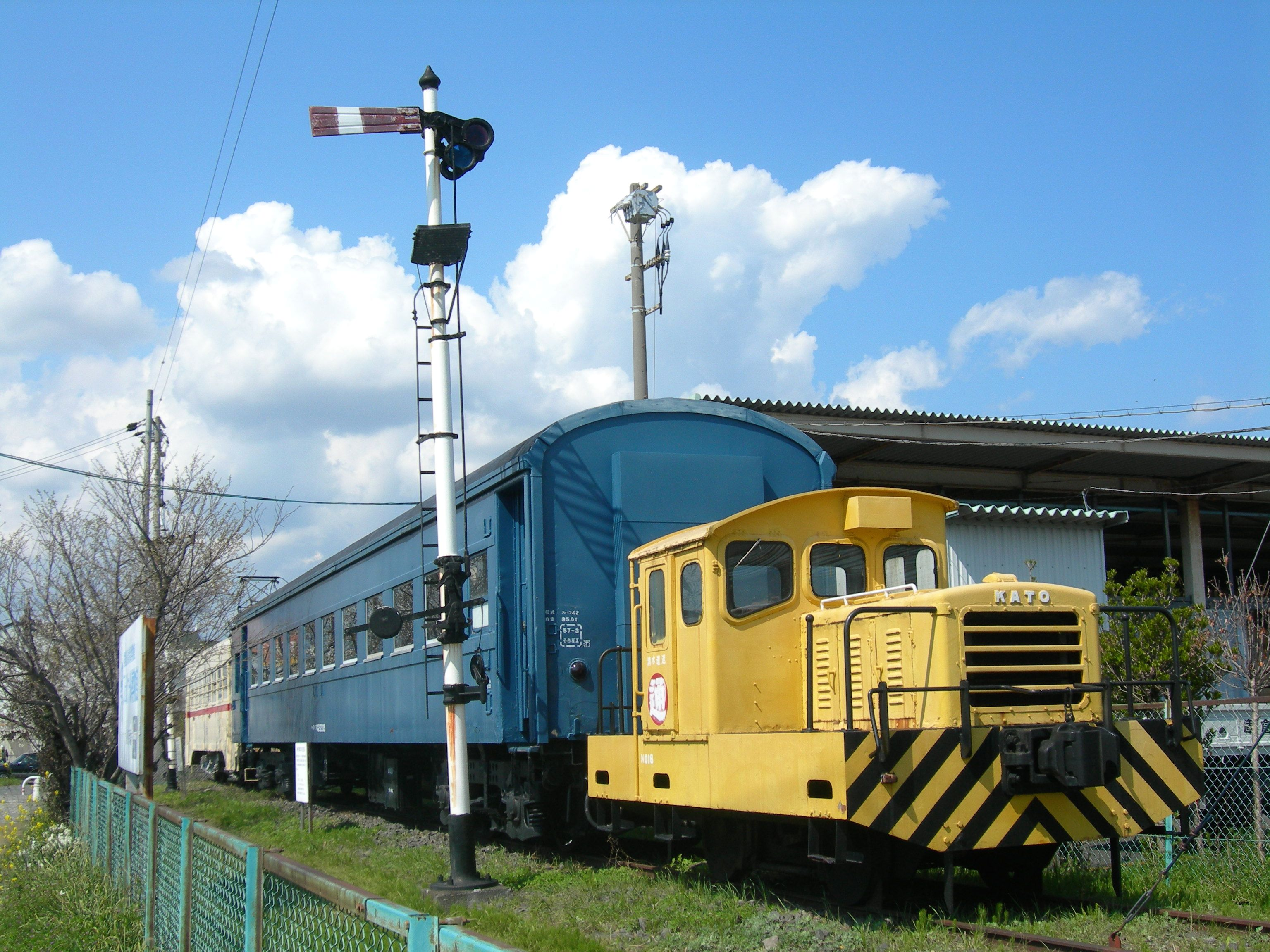 フェルケール博物館屋外展示場に保存されていた車両(現在は撤去)